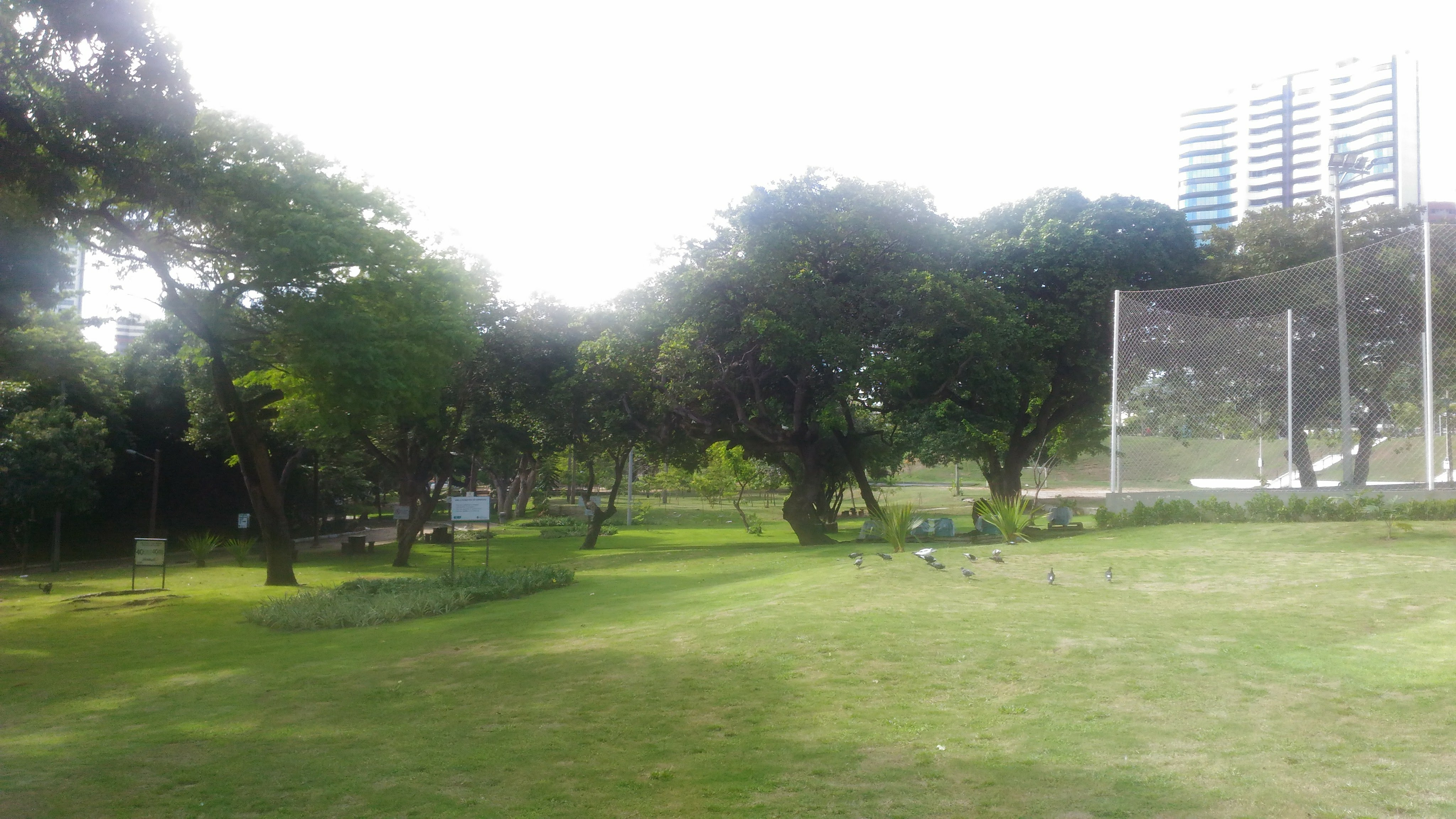 Parte do campo de Golf do Parque estadual do Cocó em Fortaleza.